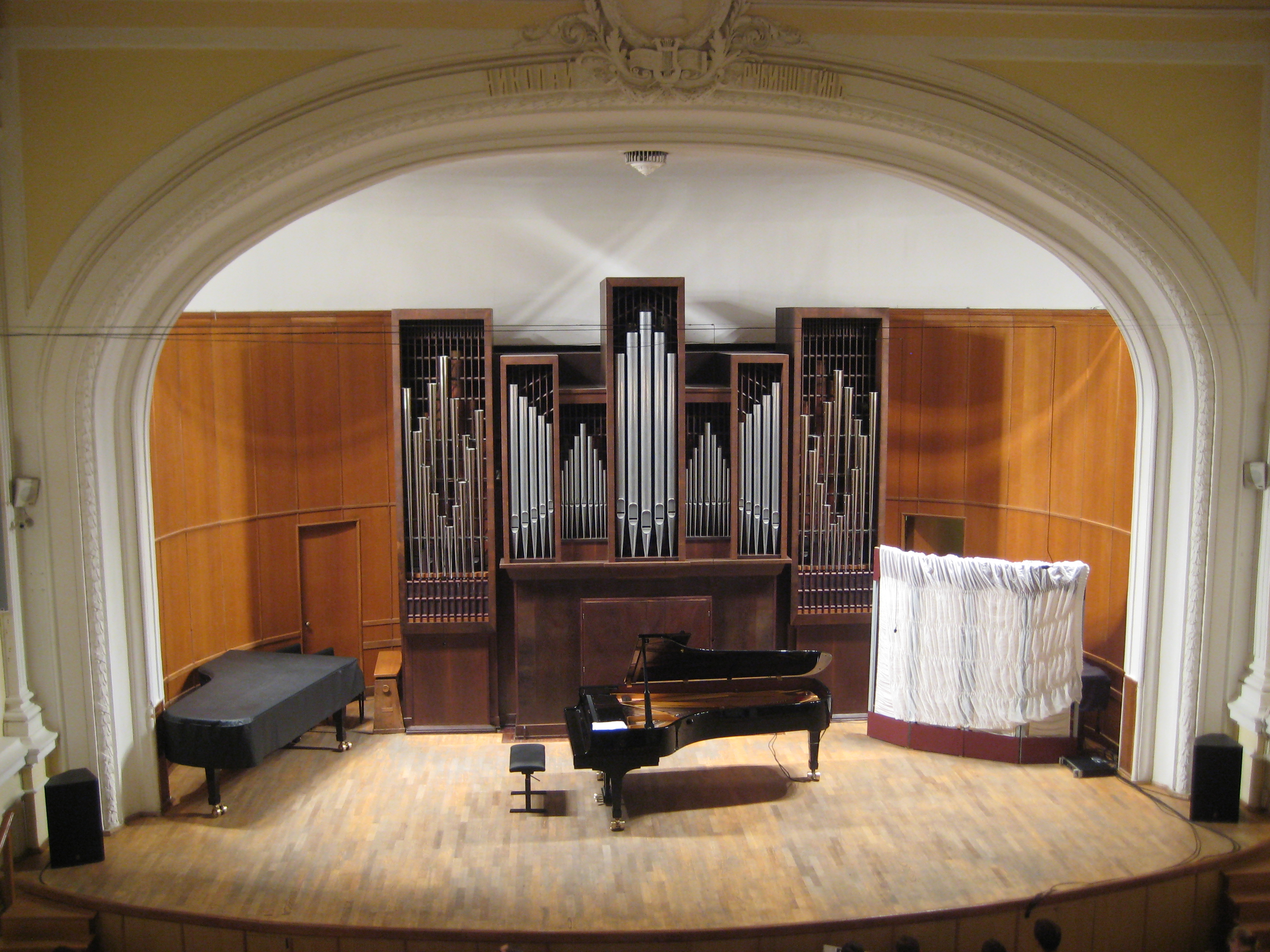 Малый зал Московской консерватории